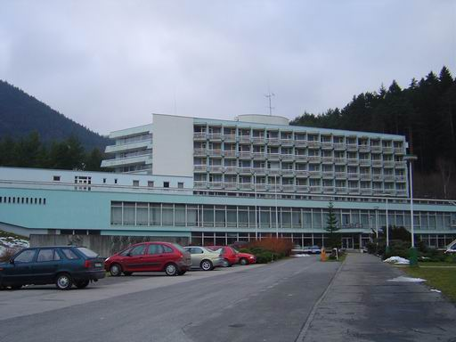 Liečebný dom Choč Obrázok odfotil Kristián Slimák. Kategória:Obrázky budov Kategória:Presunúť na Commons